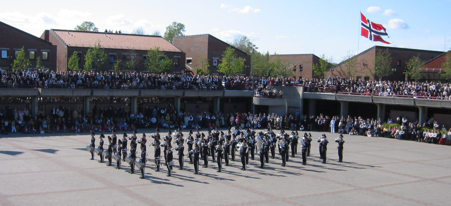 Garden i Huseby leir